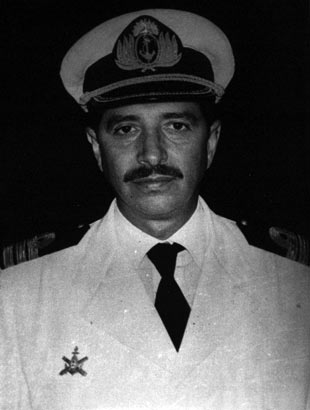 Almirante Robacio.